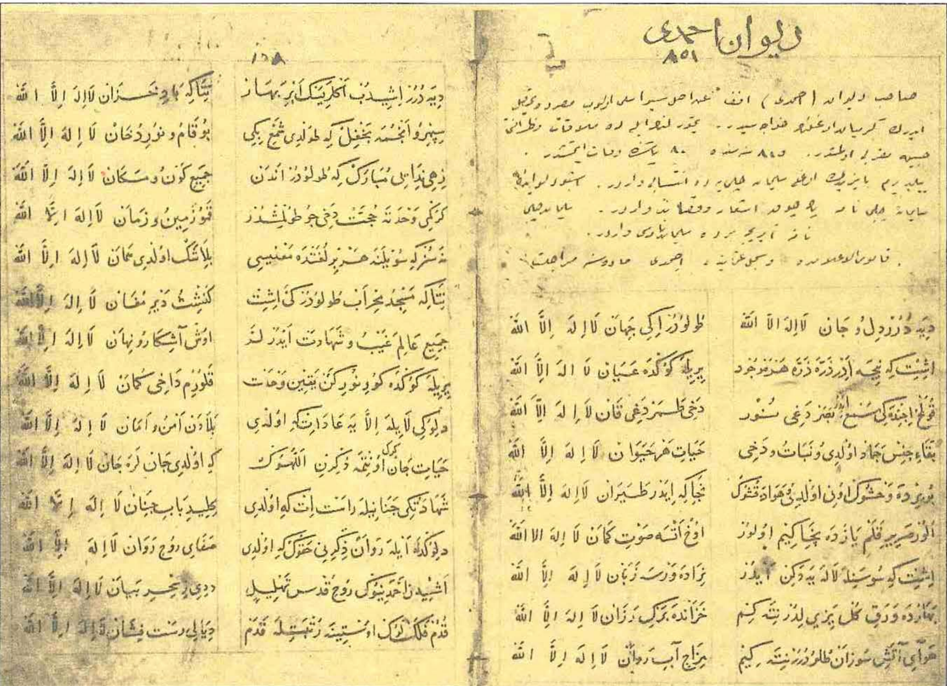 Разворот (две страницы) Дивана Ахмеди, находящегося в библиотеке Ватикана. Turc nr. 196